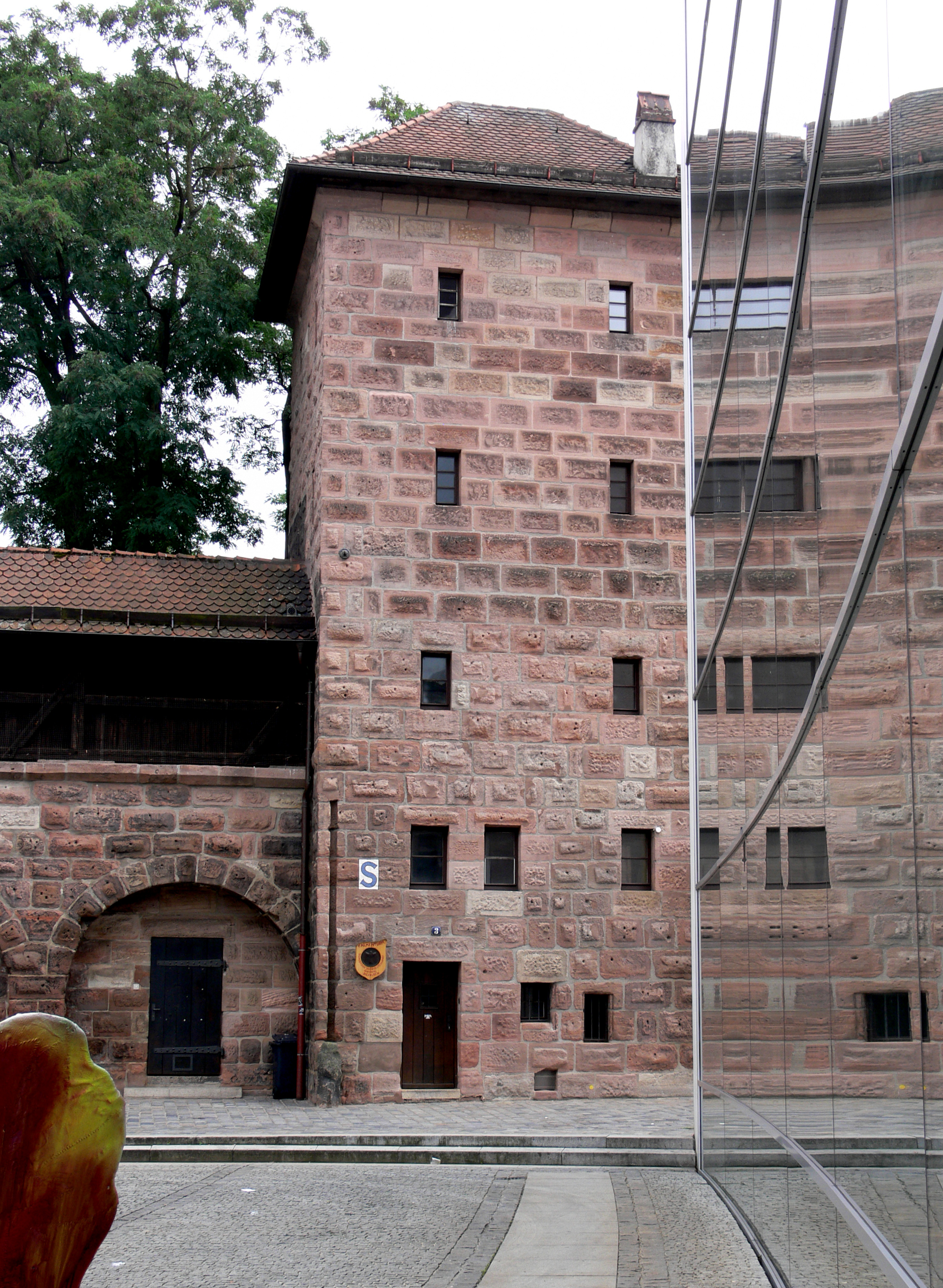 Nürnberg, Frauentormauer Turm Blaues S (Innenseite) mit der Fassade des Neuen Museums (rechts)